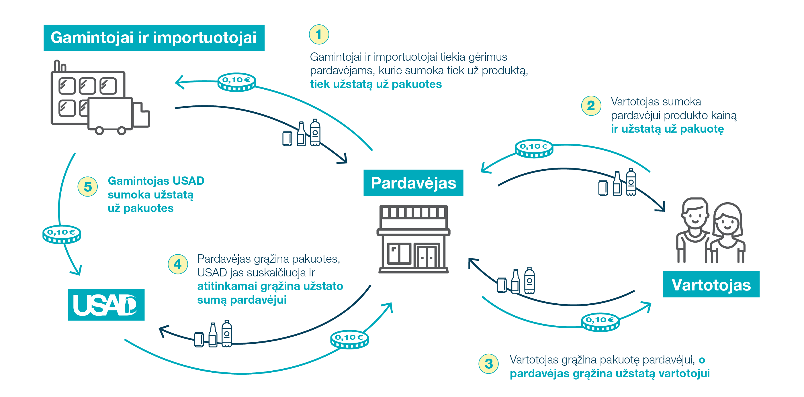 Vienkartinių gėrimų pakuočių užstato sistemos Lietuvoje veiklos schema